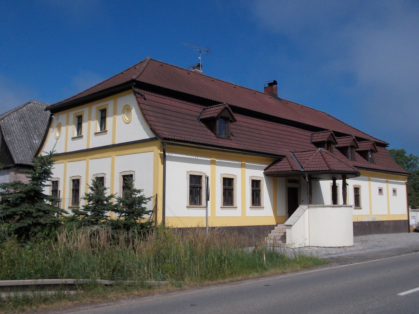 Venkovská usedlost, u hlavní silnice 24, Kumburský Újezd